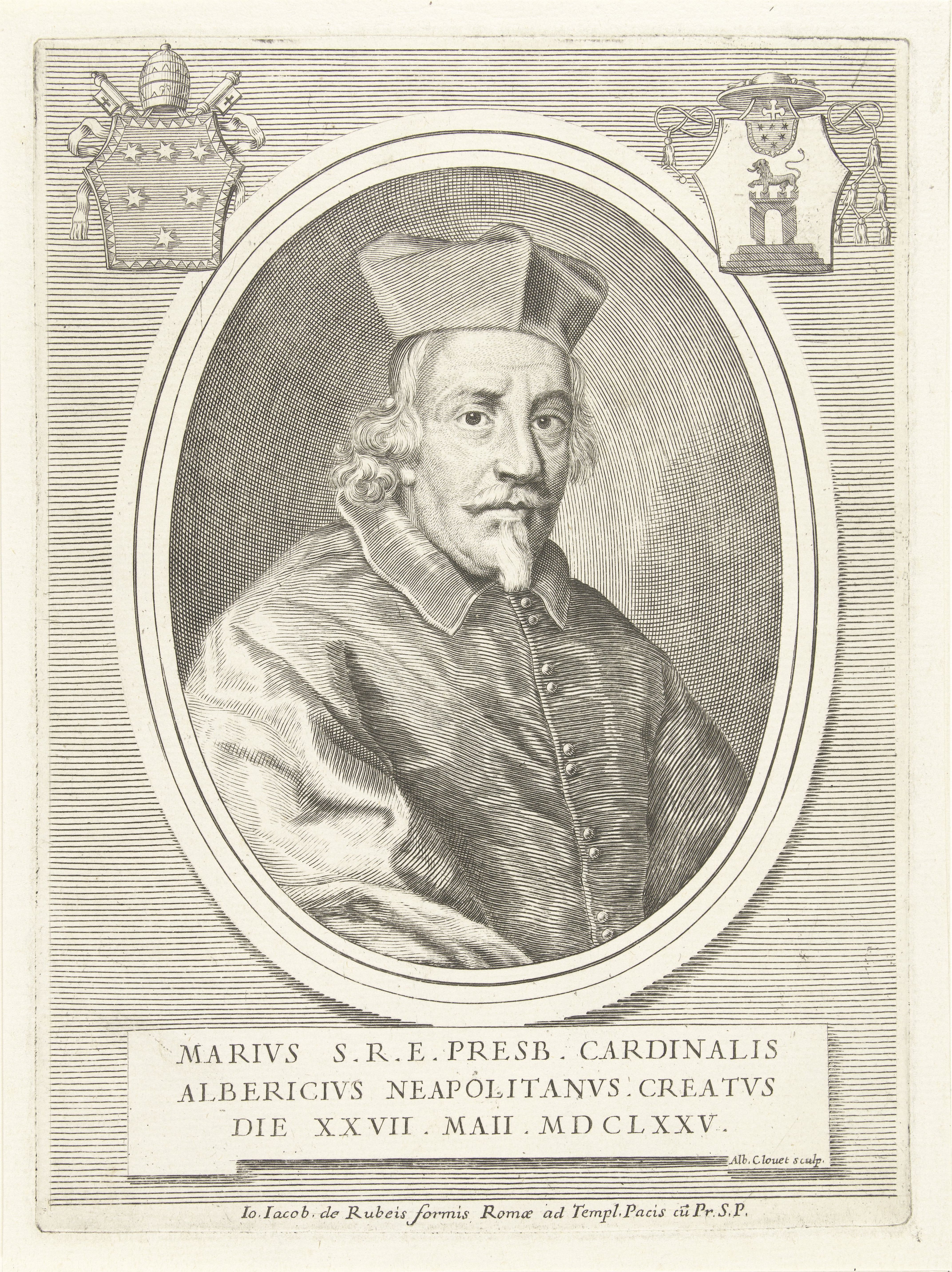 IdentificatieTitel(s): Portret van kardinaal Mario AlberizziEffigies Cardinalium nunc viventium (serietitel)Objecttype: prent Objectnummer: RP-P-1909-4366Catalogusreferentie: Singer 657Hollstein Dutch 8Opschriften / Merken: verzamelaarsmerk, verso midden, gestempeld: Lugt 2228Omschrijving: Portret in ovale lijst van kardinaal Mario Alberizzi. Buste naar rechts. Bovenaan links het wapen van paus Clemens X, bovenaan rechts het wapen van kardinaal Mario Alberizzi. De prent heeft een Latijns onderschrift met gegevens over de geportretteerde.VervaardigingVervaardiger: prentmaker: Albertus Clouwet (vermeld op object)naar eigen ontwerp van: Albertus Clouwetuitgever: Giovanni Giacomo de'Rossi (vermeld op object)Plaats vervaardiging: RomeDatering: 1675 - 1679Fysieke kenmerken: gravureMateriaal: papier Techniek: graveren (drukprocedé)Afmetingen: plaatrand: h 206 mm × b 150 mmToelichtingdeel van een serie met als titel "Effigies Cardinalium nunc viventum". De serie bestaat uit portretten van kardinalen.OnderwerpWie: Mario AlberizziVerwerving en rechtenVerwerving: aankoop 1905Copyright: Publiek domein